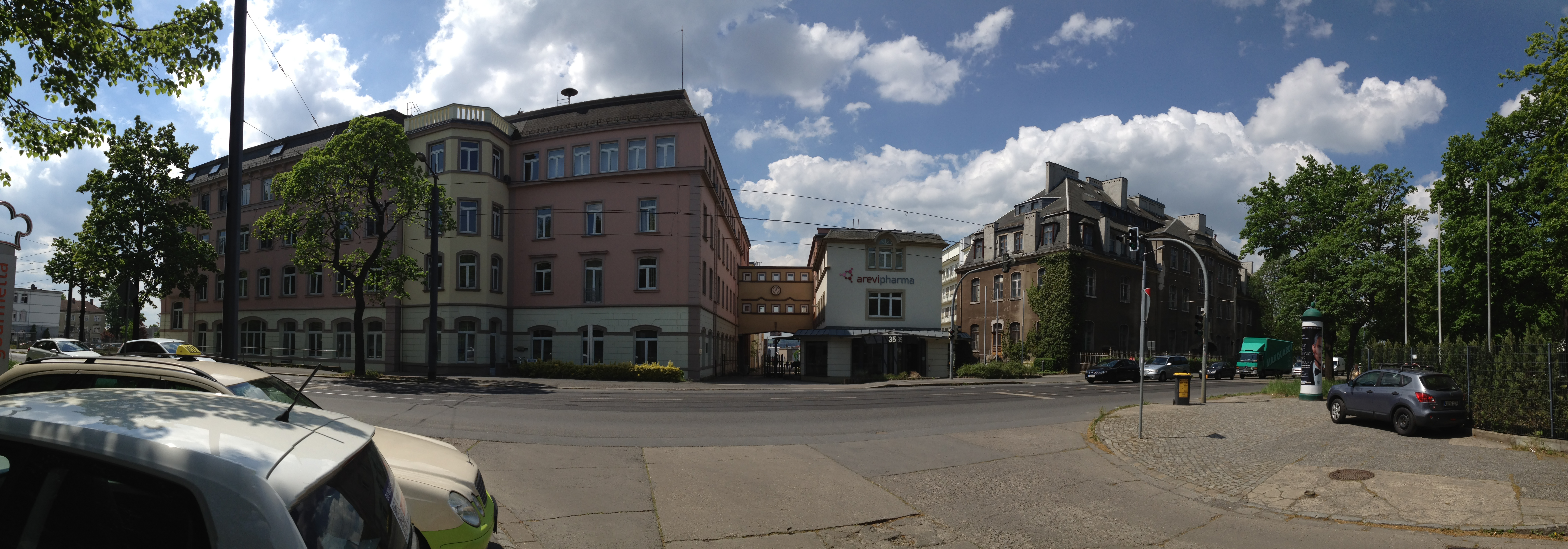 Radebeul, Chemische Fabrik v. Heyden Meißner Straße 35/37